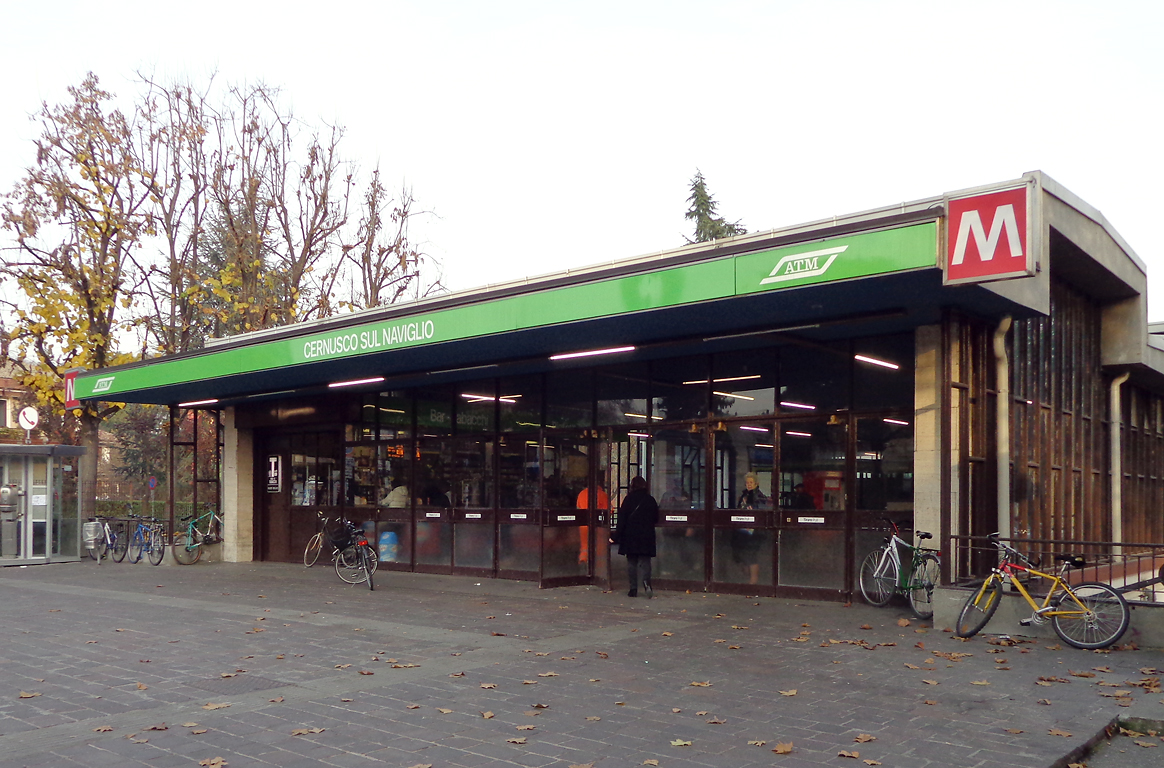 Stazione di Cernusco sul Naviglio della metropolitana di Milano, il fabbricato del mezzanino